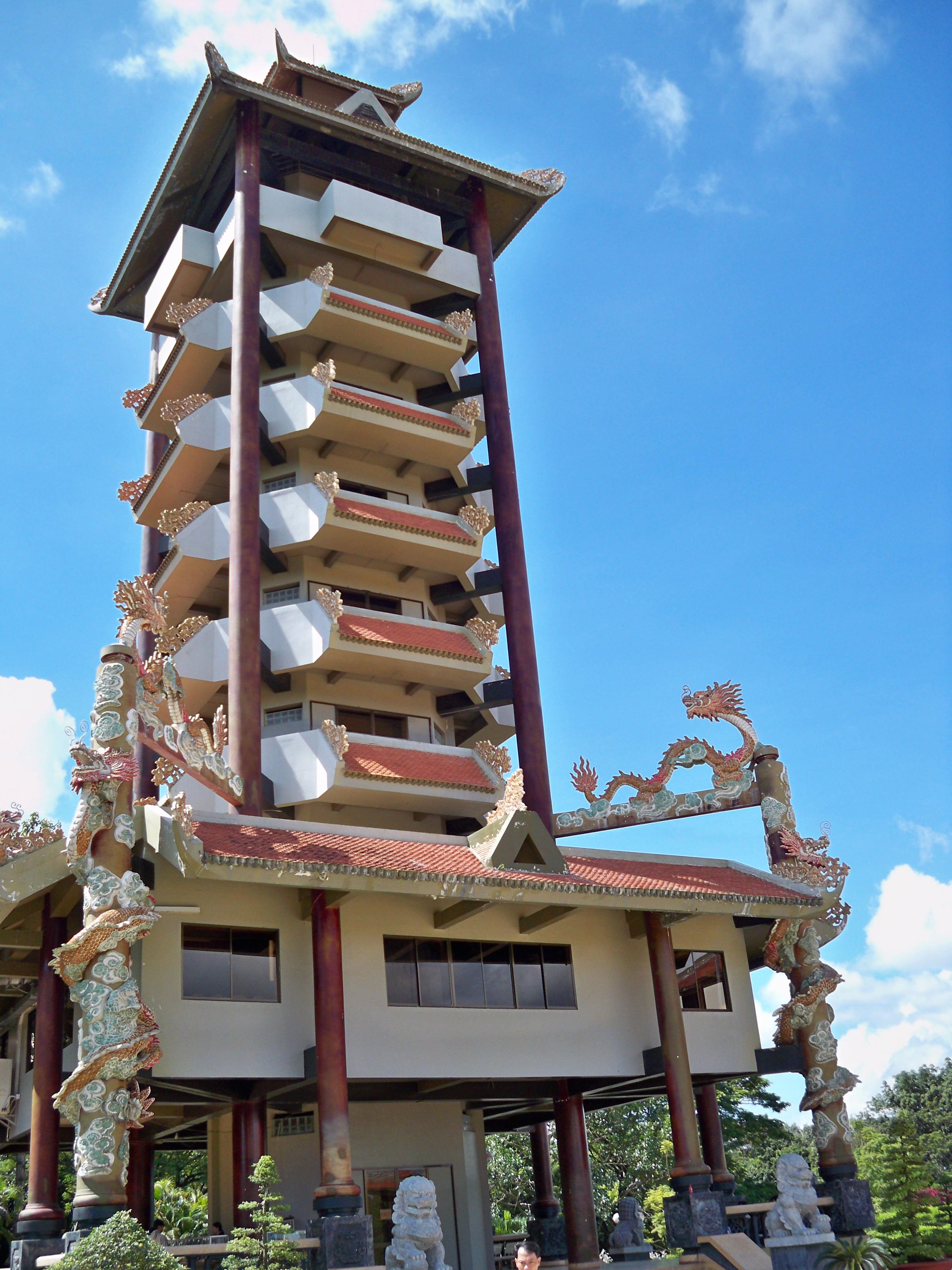 Tháp chính đền Bến Dược do Phan Minh Châu chụp tại Bến Dược cùng học sinh chuyên Trần Đại Nghĩa khảo sát thực tế.